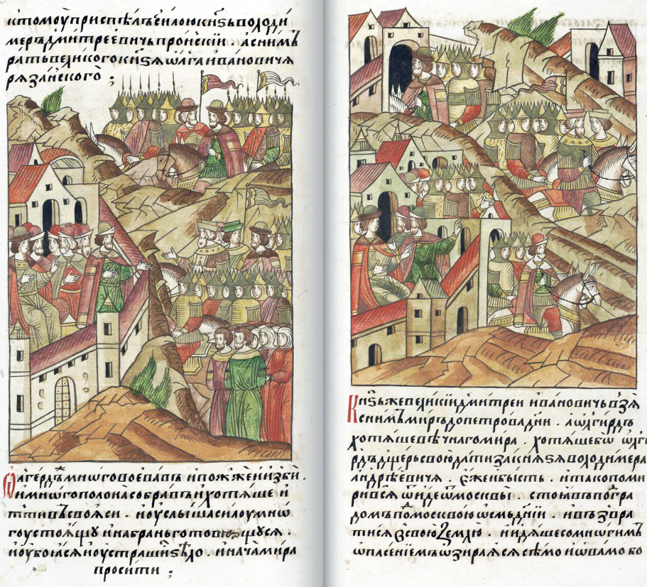 Отступление Ольгерда от Москвы. Миниатюра Лицевого свода XVI в. Отступление Ольгерда от Москвы в 1370 году. Миниатюра Лицевого свода XVI в. ЛИЦЕВОЙ ЛЕТОПИСНЫЙ СВОД [Ольгерд много завоевал, сжег, убил и захватил в плен, и решил идти обратно, но, узнав, что собралось большое войско и готовится к битве, испугался и начал просить мира.] Князь великий Дмитрий Иванович заключил с ним мир до Петрова дня, но Ольгерд хотел заключить мир навеки и решил отдать за князя Владимира Андреевича свою дочь, что и произошло. И, заключив мир, отошел князь от Москвы, пробыв под Москвою восемь дней, и вернулся в свое княжество, идя осторожно, озираясь по сторонам, опасаясь [за собой погони. Князь Михаил Александрович вернулся в Тверь, заключив мир с великим князем Дмитрием Ивановичем.]